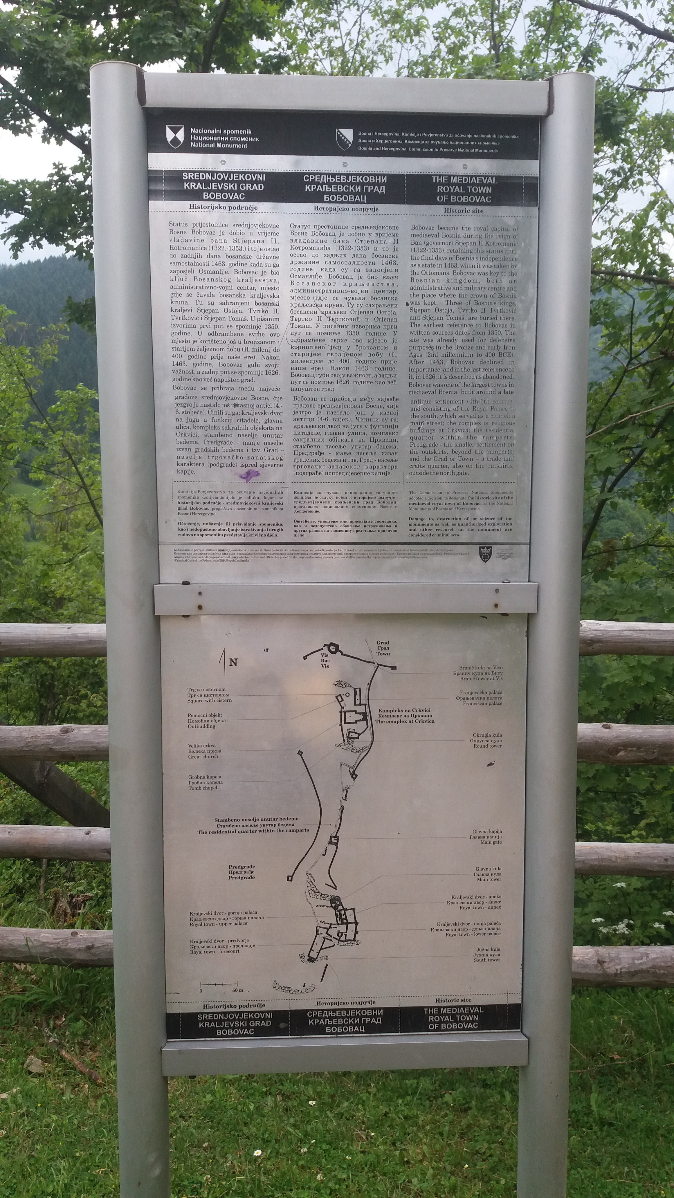 Informativna tabla na ulazu u Bobovac